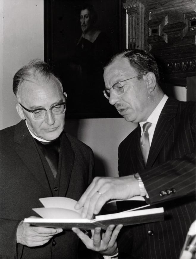 Drs. L.J.M. van Laar (KVP), staatssecretaris van O.K. en W reikt de PC -Hooftprijs uit aan Prof Van der Meer(links). Muiderslot, Nederland, 16 juni 1964.